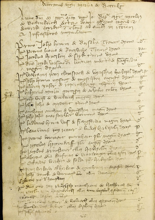 Matrikel der Universität Heidelberg (Band 1): 1386-1432, S. 63v; editiert bei Toepke, Gustav (Hrsg.): Die Matrikel der Universität Heidelberg: Von 1386 - 1553 ; nebst einem Anh. enth.: 1. Calendarium acad. vom Jahre 1387 …; Heidelberg 1884, S. 93 UB Heidelberg